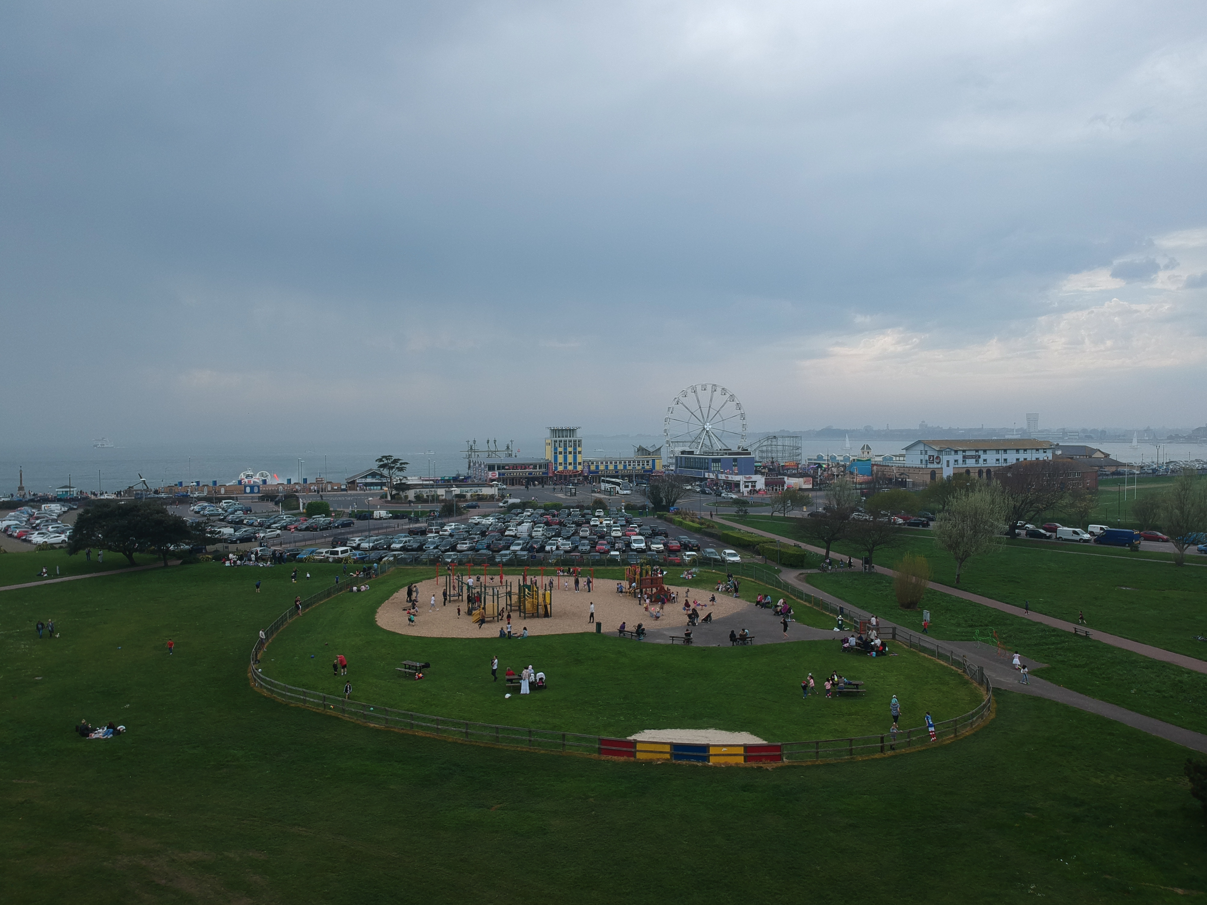 drone photo of Clarence Pier